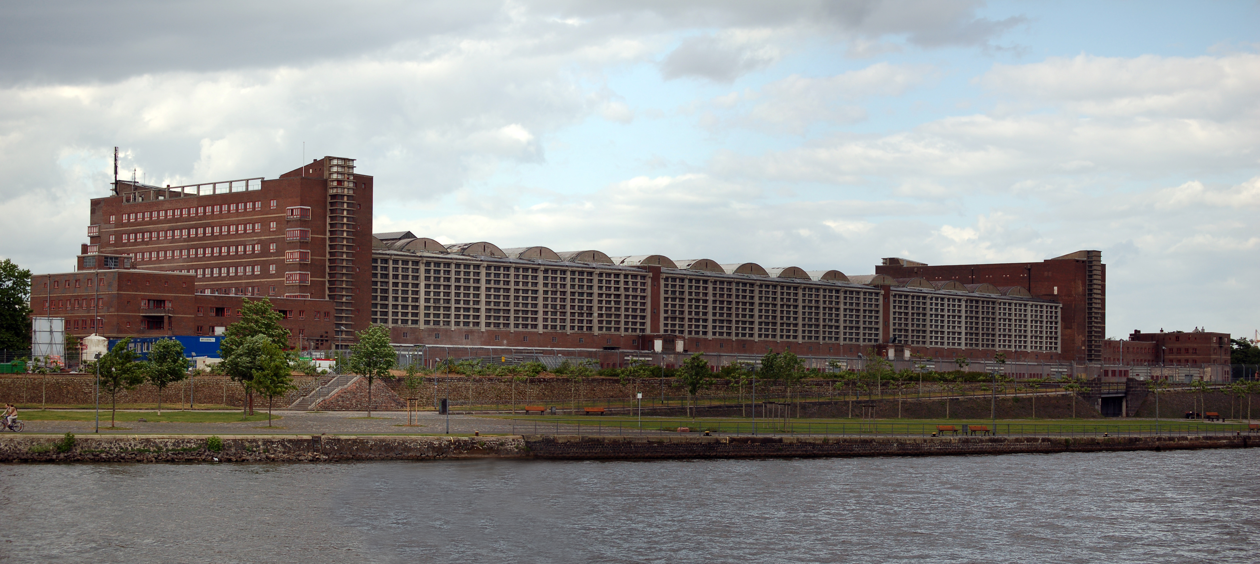 Panorama der Großmarkthalle Frankfurt